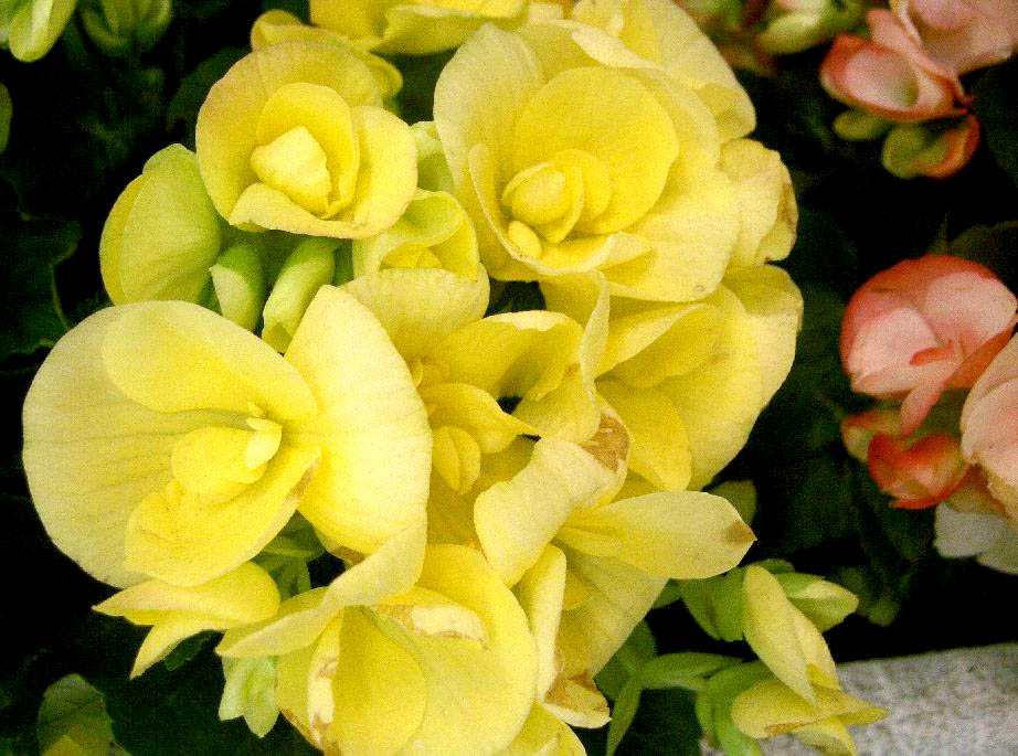 Begonia